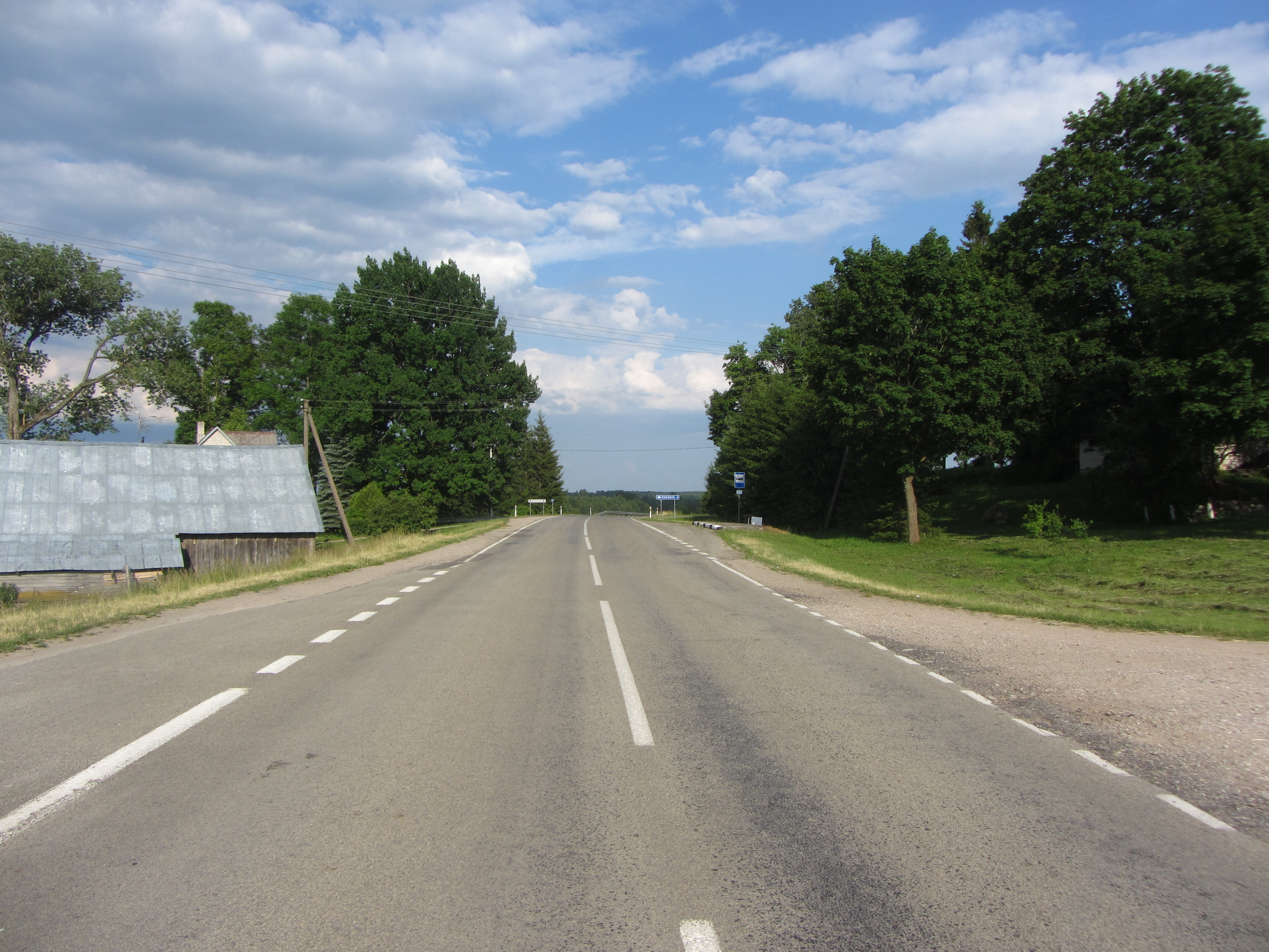 Skraičionys 62191, Lithuania